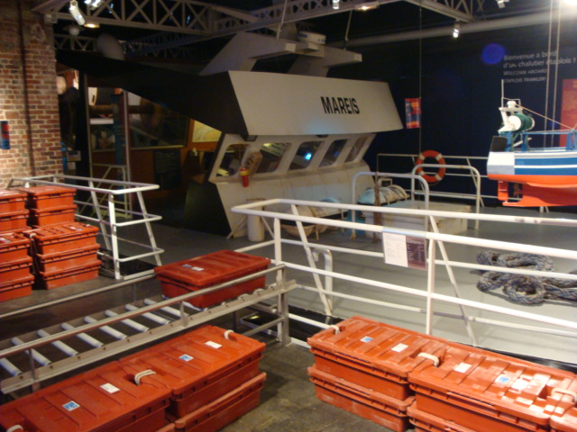 le quai Loubet au Mareis